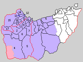 後の愛媛県周桑郡域の町村制時点の町村。